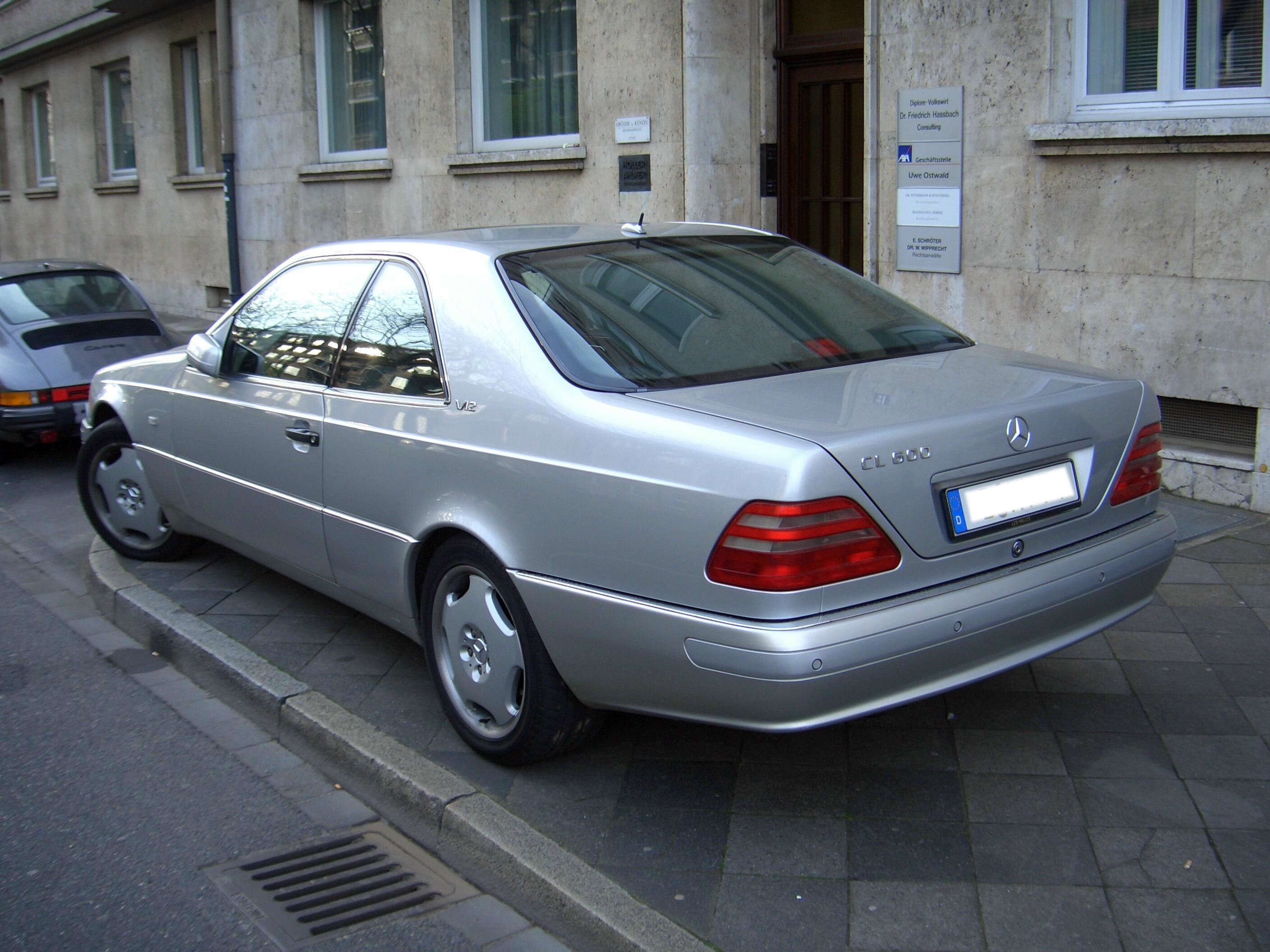 Mercedes-Benz CL 600, series C140 1991-1998, seen in Düsseldorf, Germany